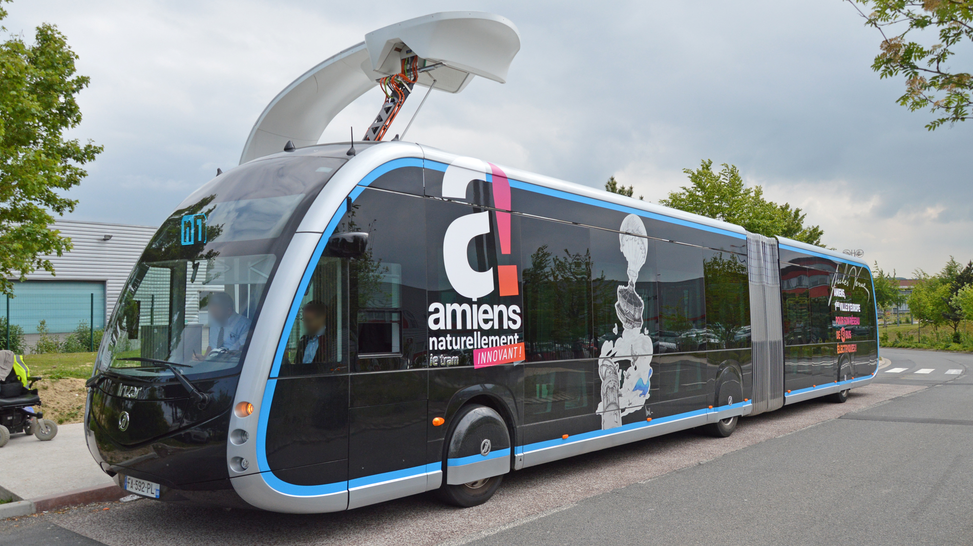 Ametis-Bus de la Ligne N1 avec la livrée événementiel